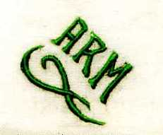 Chiffre au point de cordon avec paraphe sur signature. Collection M.Peccaud